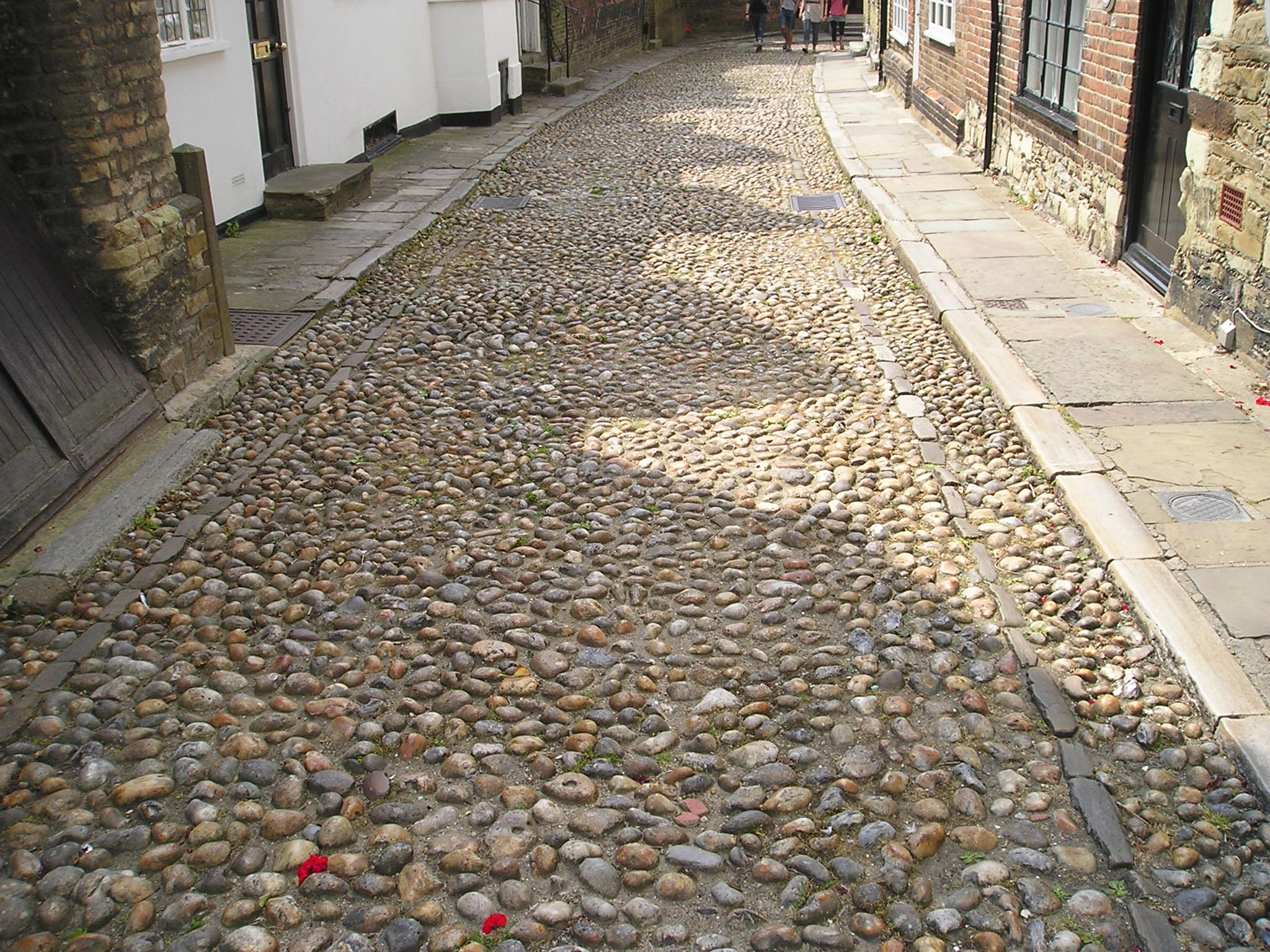 Rye_Kopfsteinplaster